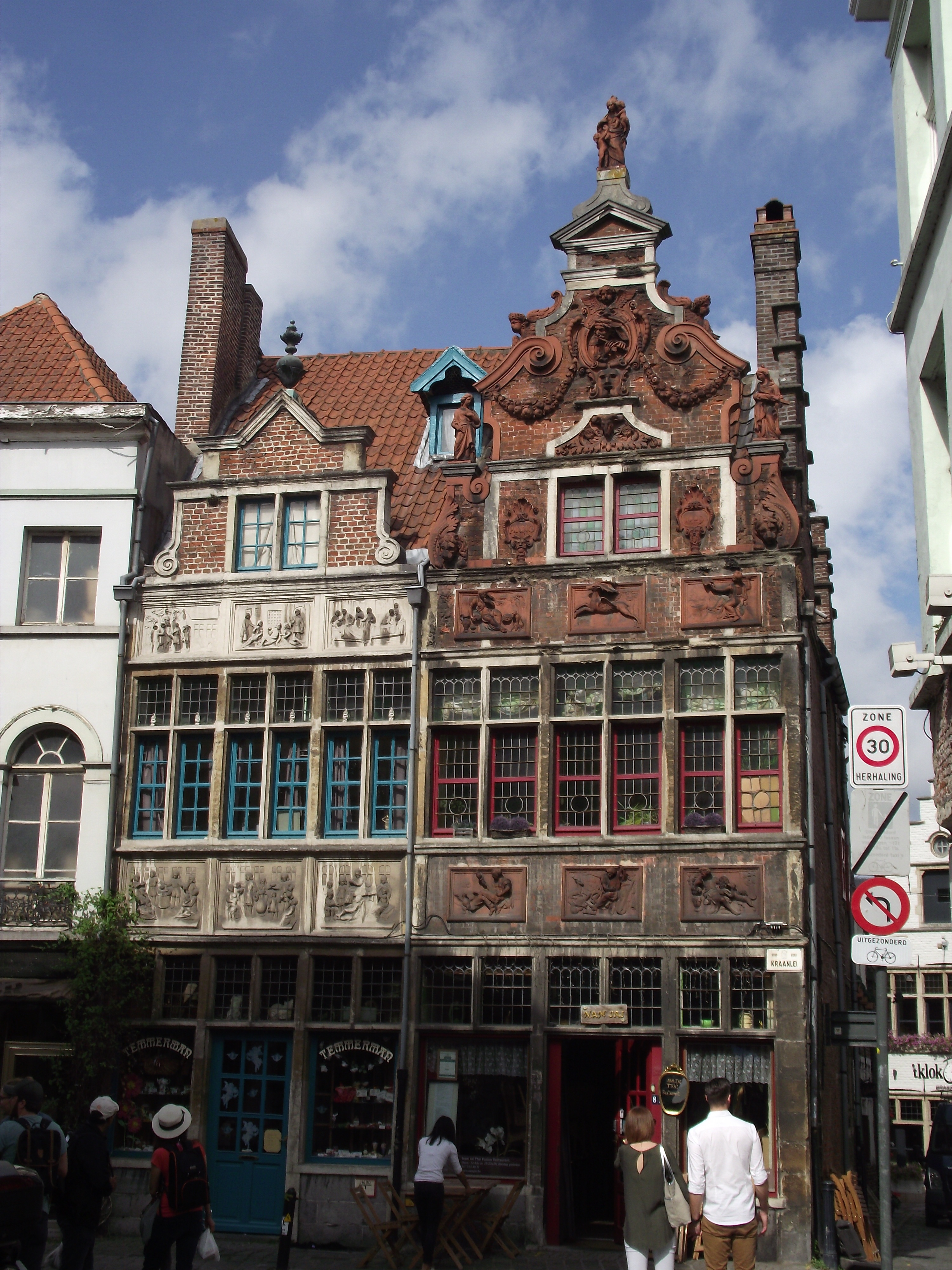 Gent, Huis De Werken van Barmhartigheid met Barok hoekhuis De Fluitspeler of Het Vliegend Hert